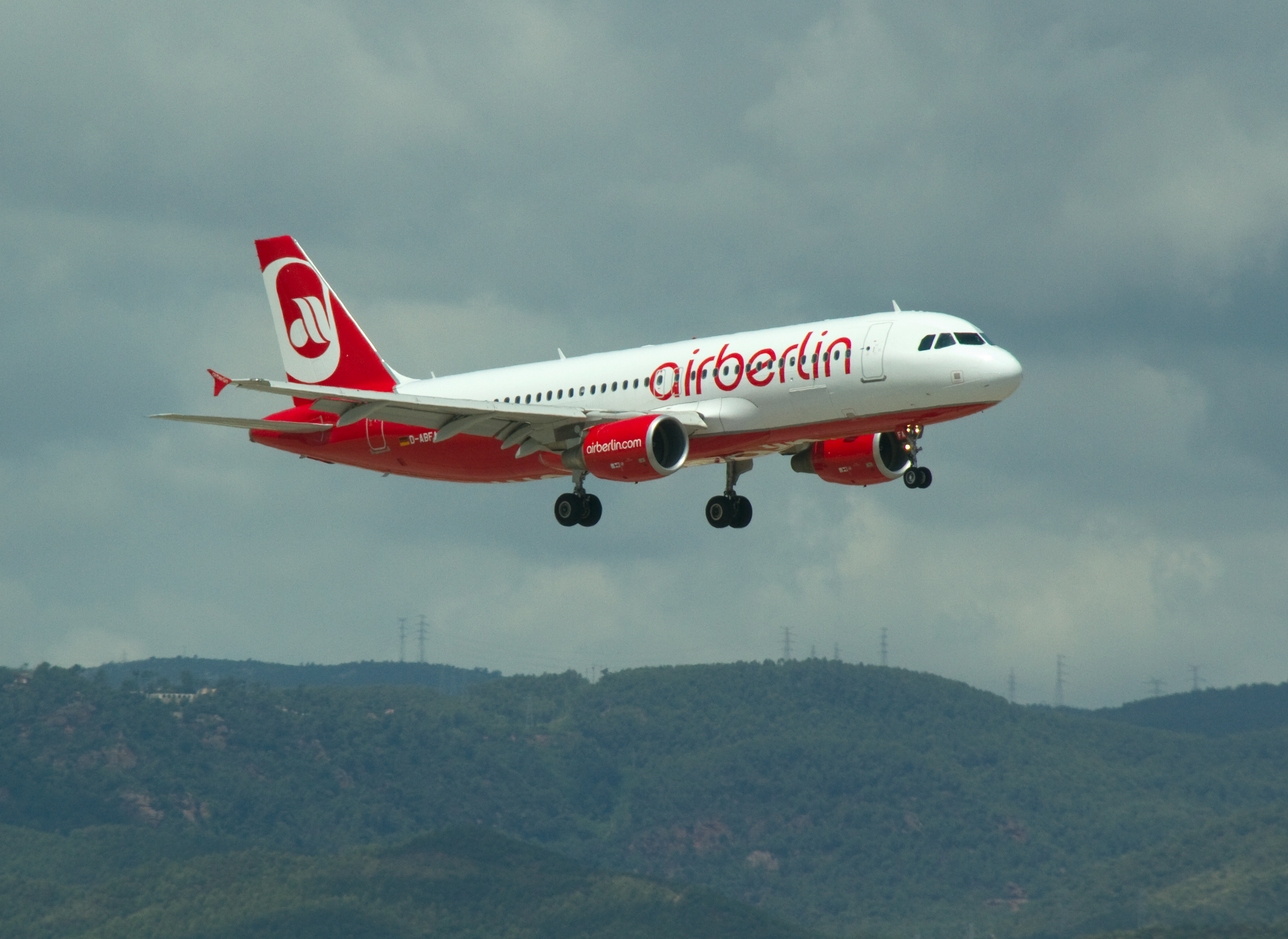 airberlin D-ABFA